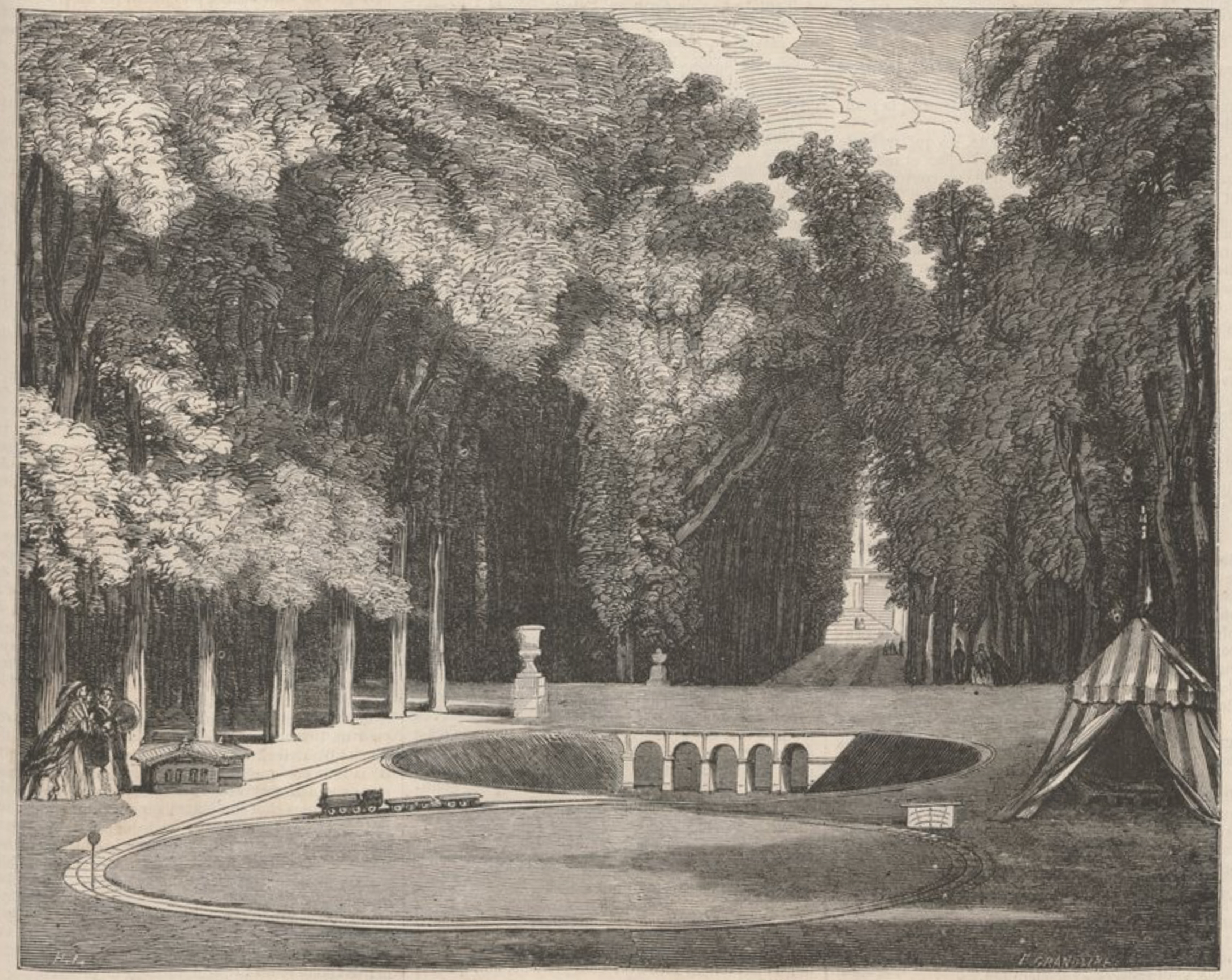 Die Eisenbahn des kaiserlichen Prinzen im Park von Schloss Saint-Cloud; Holzstich nach Fotografie